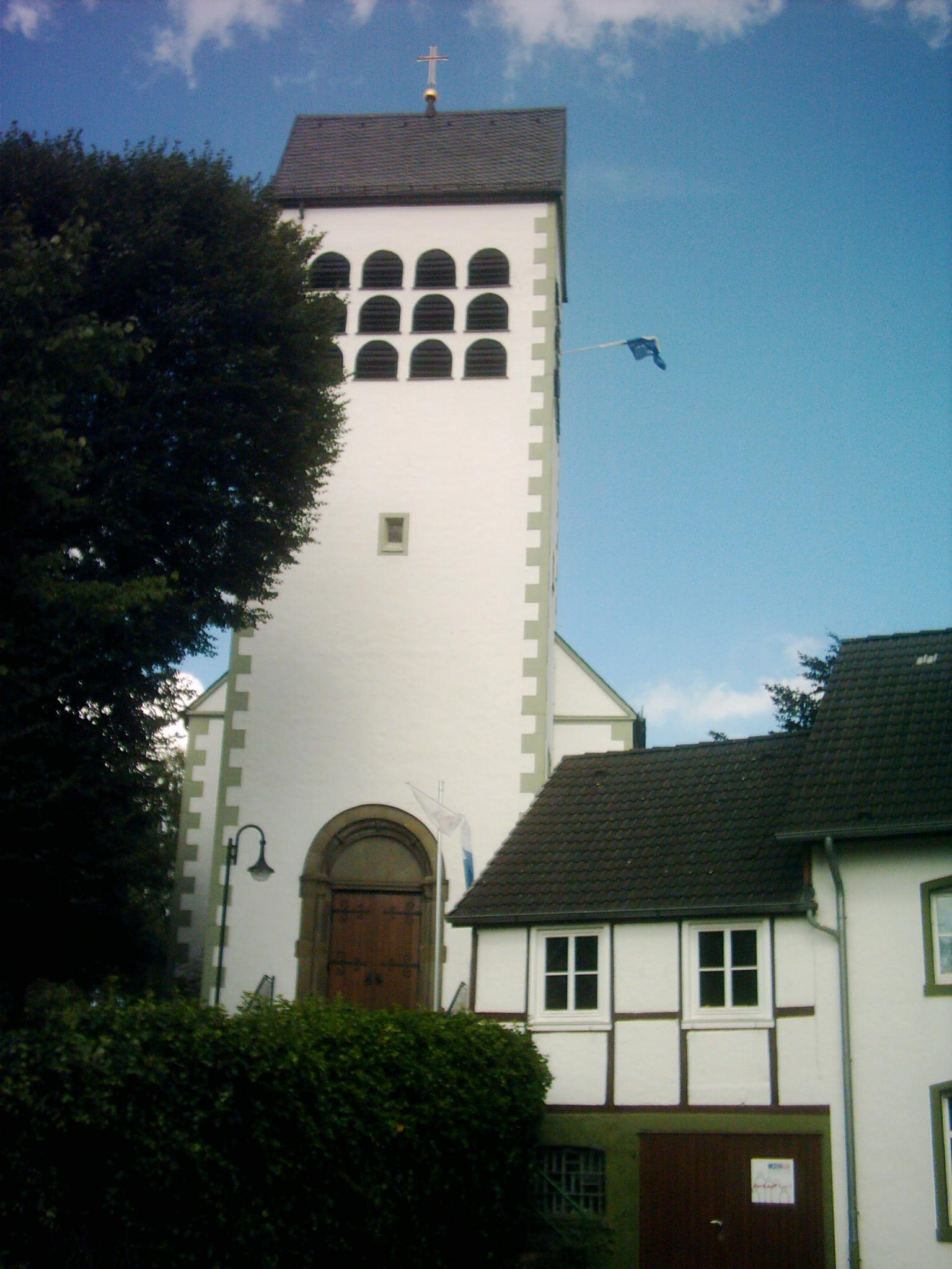 Dorfkirche St. Elisabeth in Möhnesee-Wamel, oberes Dorf